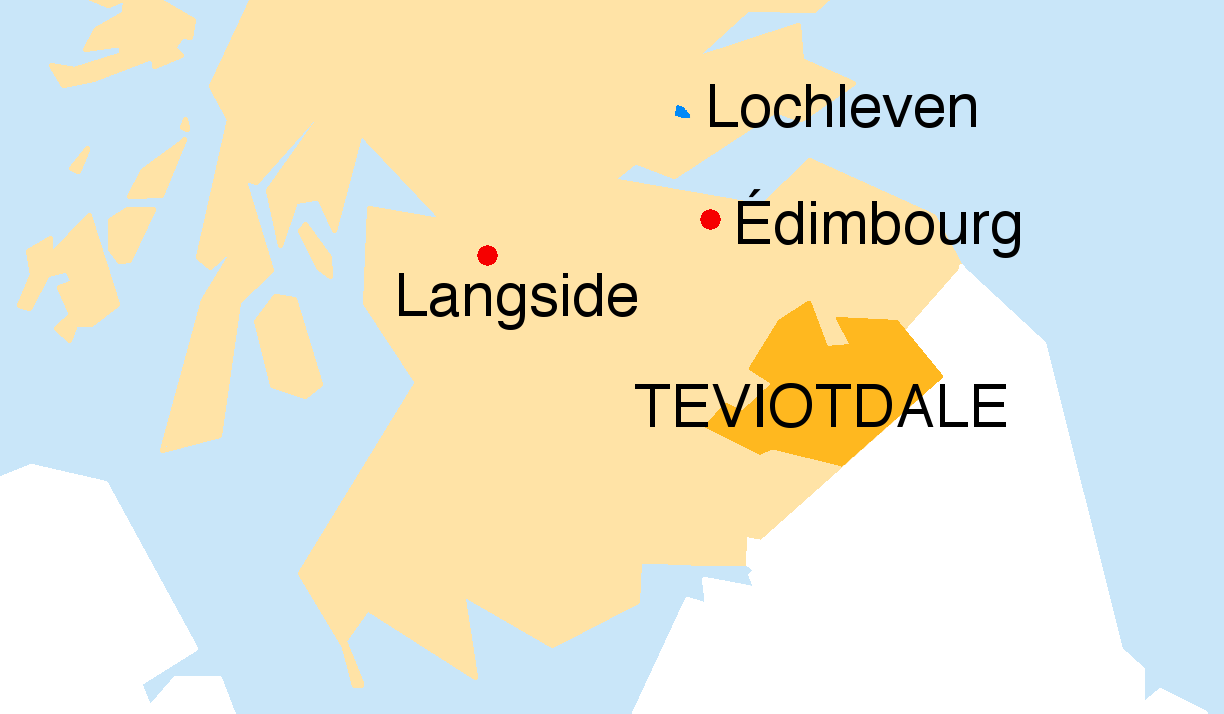 Principaux lieux où se déroule le récit de L'Abbé (The Abbot), roman de Walter Scott. Très schématisé, d'après Map of Scotland within the United Kingdom.svg, de Peeperman, 2012, pour le tracé des côtes ; et d'après Scotland in the Middle Ages; sketches of early Scotch history and social progress (1860) (14763938344).jpg, d'Innes, Cosmo Nelson, 1798-1874, pour le tracé du Teviotdale.